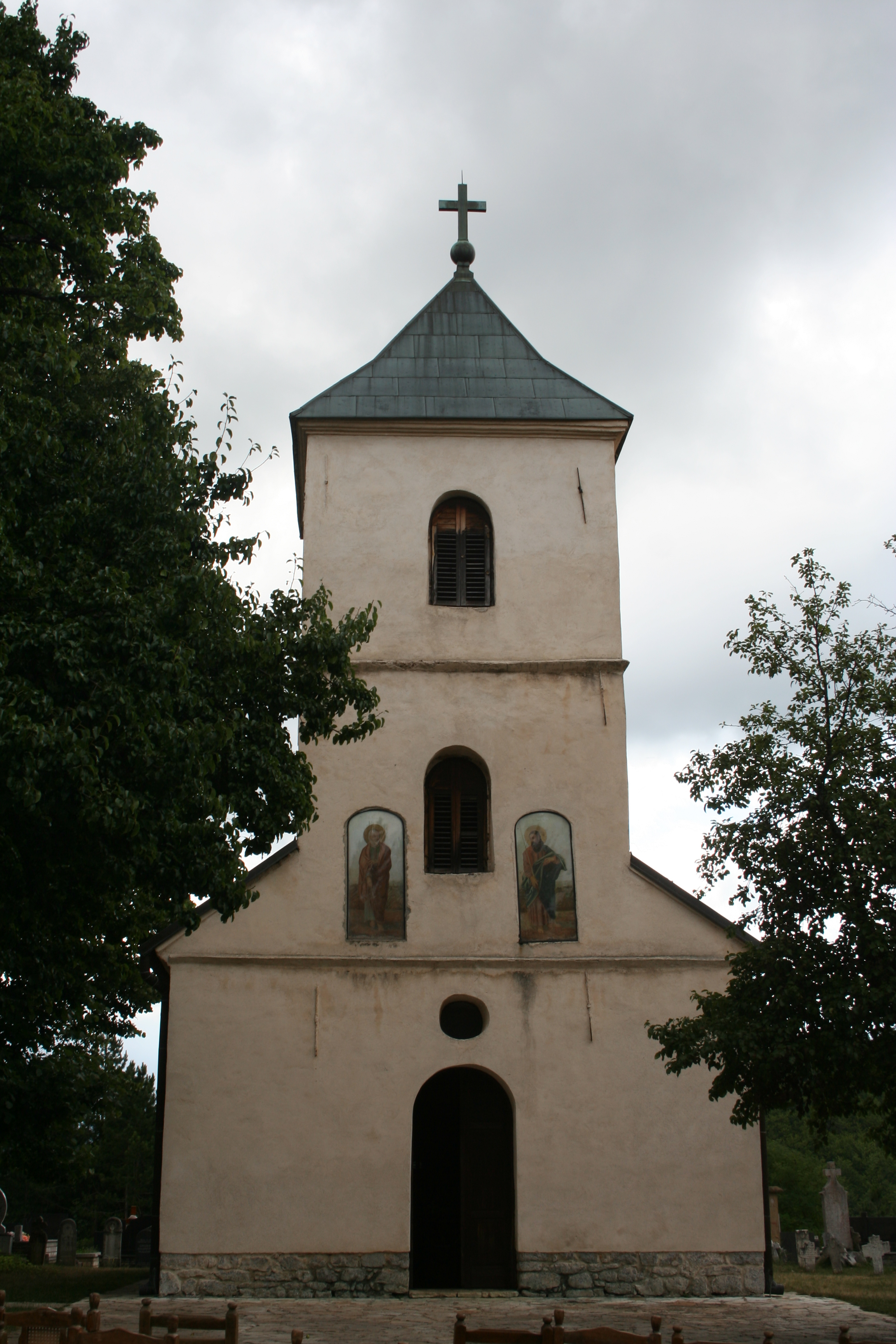 Crkva Svetih apostola Petra i Pavla u Sirogojnu